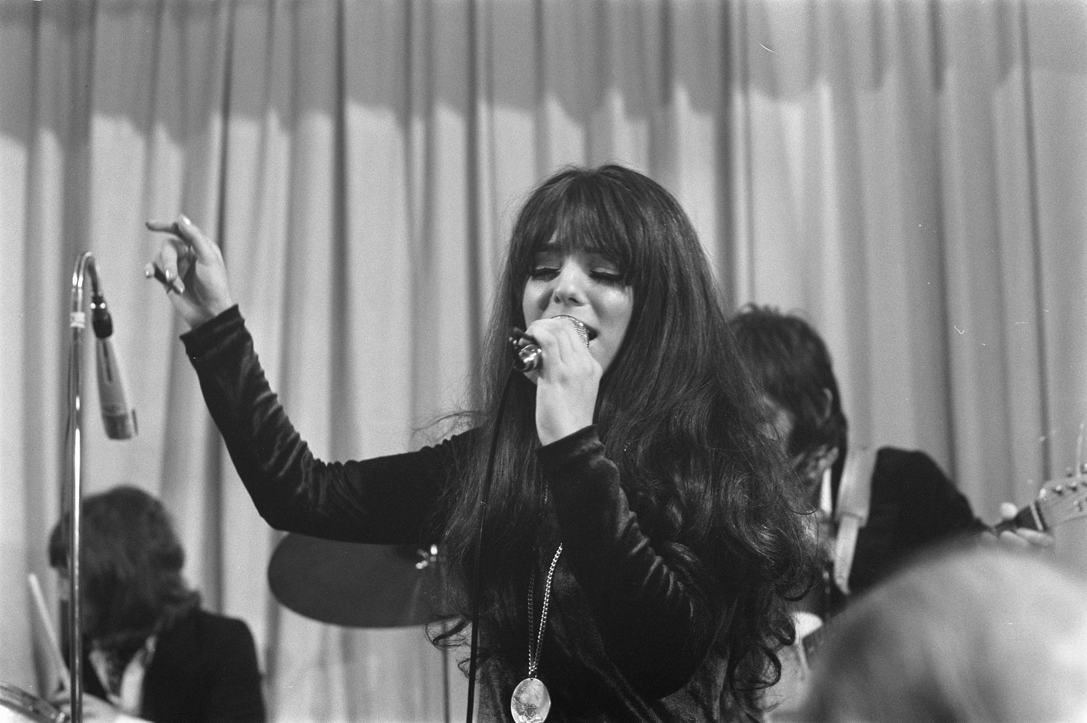 Shocking Blue treedt op in Den Haag ter gelegenheid van de ontvangst van de zilveren penning van verdiensten.